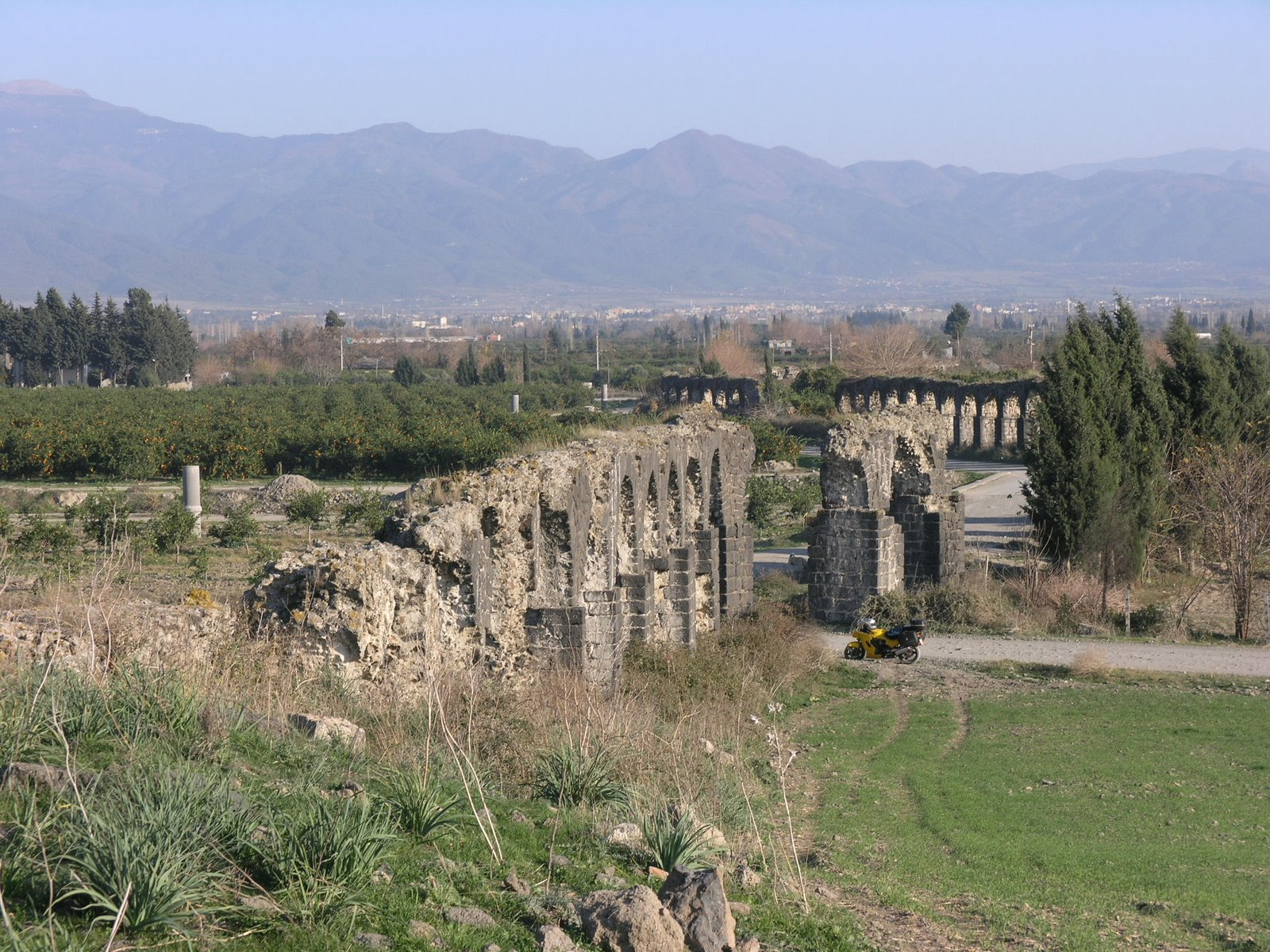 İssos Harabeleri